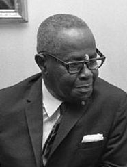 Bundesratspräsident Lemke empfängt (f. Bundespräsident Lübke) Dir Clifford Campbell, Generalgouverneur von Jamaika